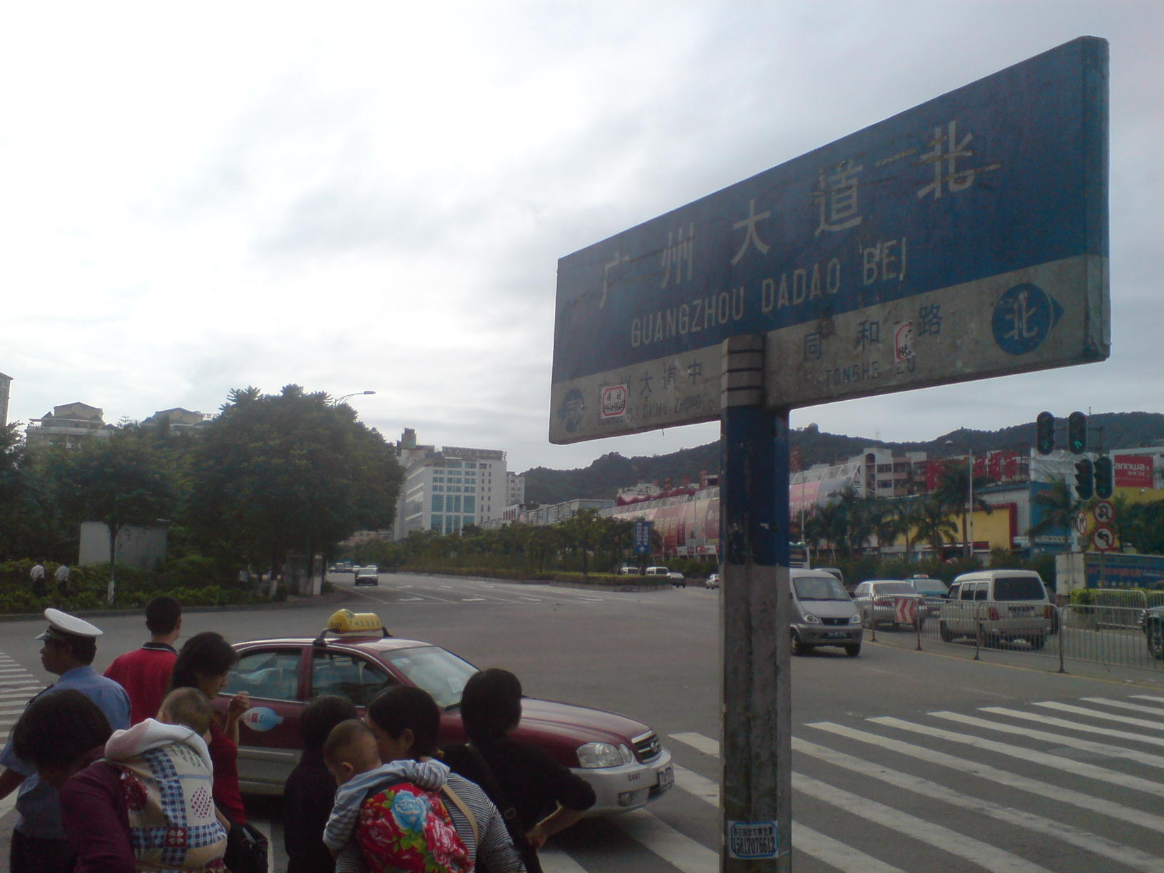 广州大道北，摄于京溪路口。